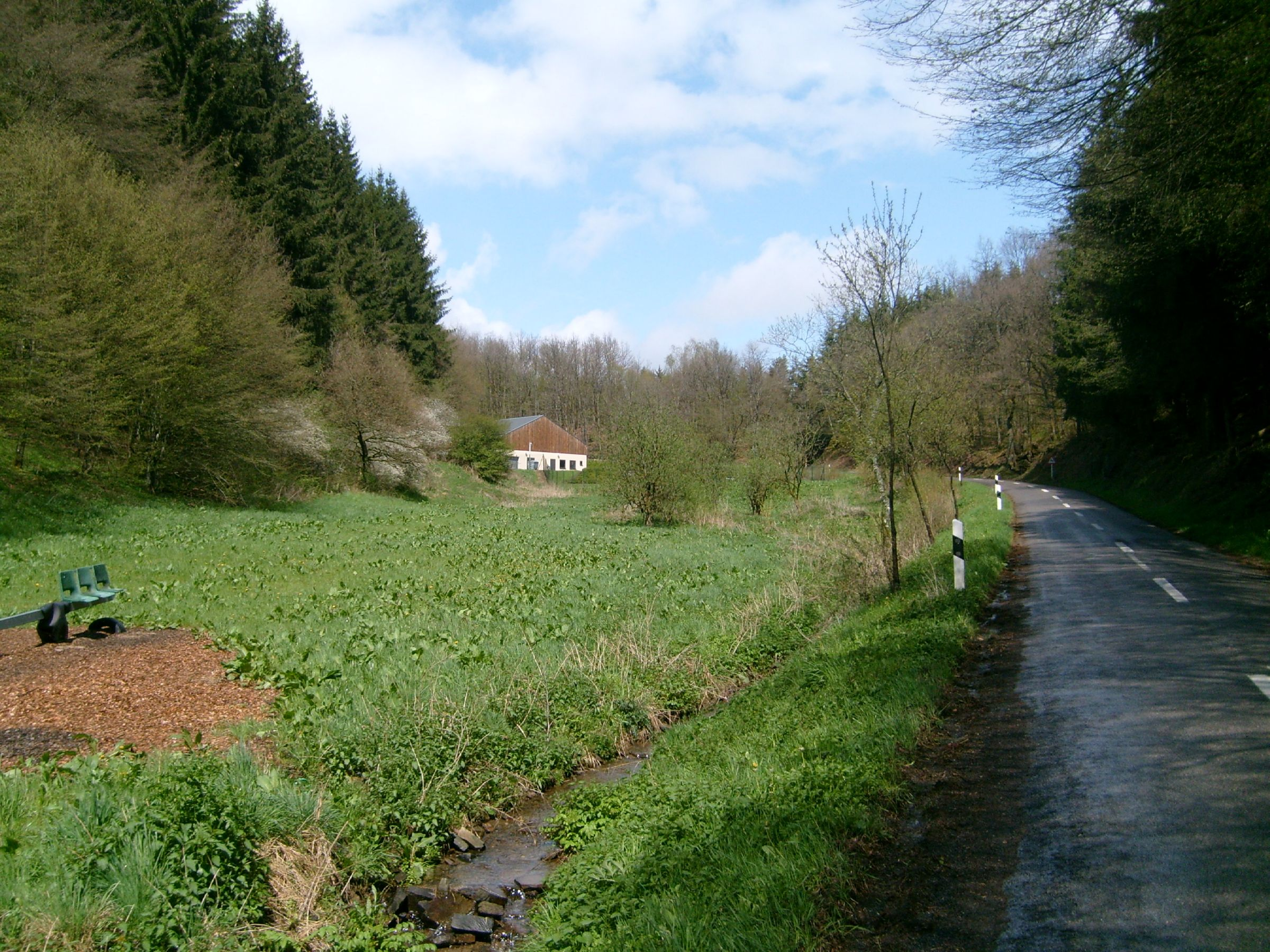 D'Feierbech uewt der Tëntesmillen, Feierbech